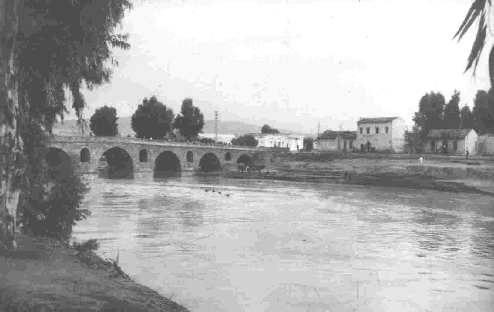 Oued Medjerda à Medjez El Bab en 1947, Tunisie